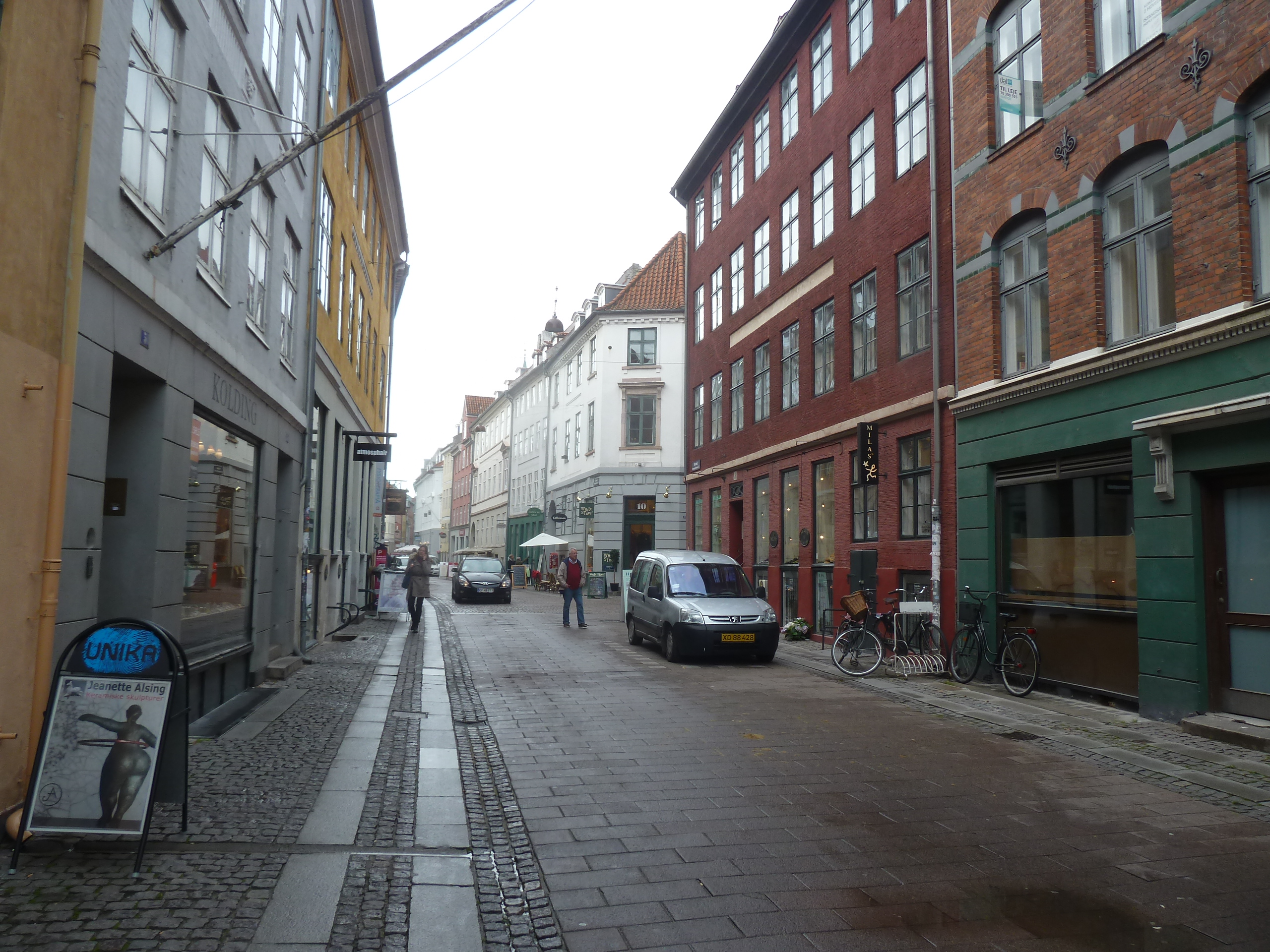 The street Kompagnistræde in Indre By in Copenhagen.